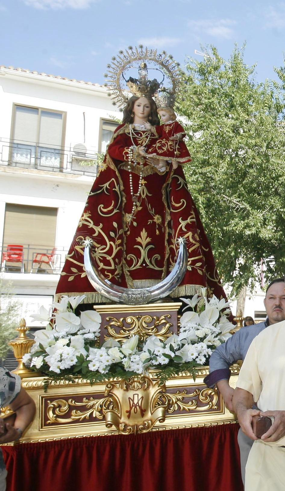 Imagen de la Virgen de la Virgen de Gracia durante las fiestas patronales de San Roque y la Virgen de Gracia, en Mahora (agosto de 2013)